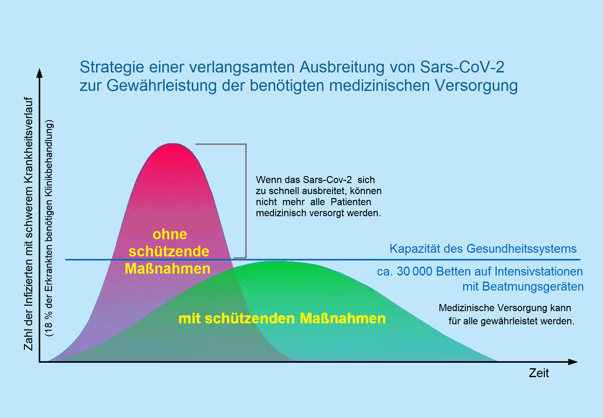 Strategie der deutschen Bundesregierung durch die Verlangsamung der Ausbreitung der Sars-CoV-2 Epidemie mithilfe von schützenden Maßnahmen auch langfristig die medizinische Versorgung von Patienten mit schwerem Krankheitsverlauf zu gewährleisten.